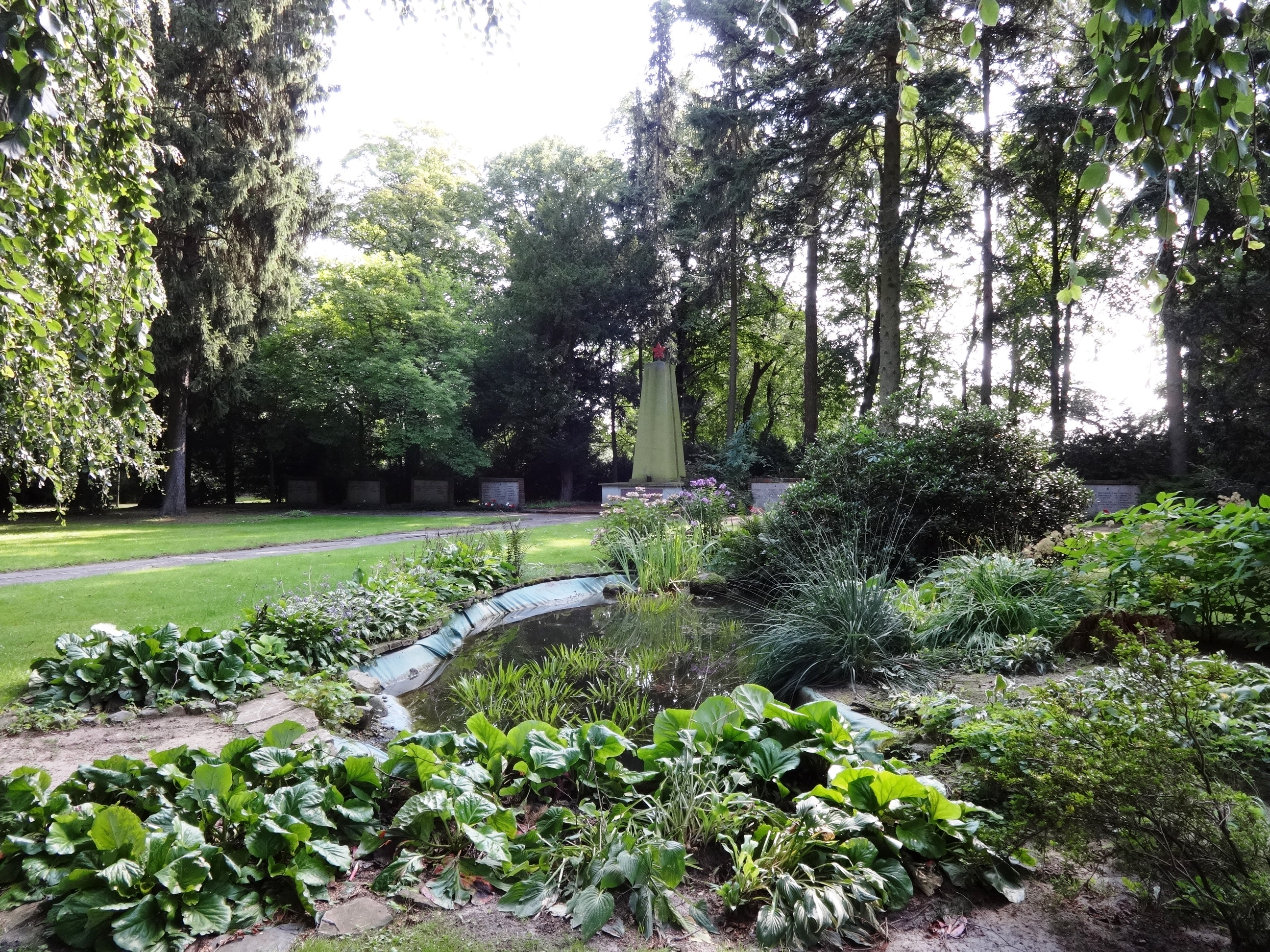 Neuer Friedhof im Nordwesten von Greifswald mit Trauerhalle, Krematorium und Sowjetischem Ehrengrab in Mecklenburg-Vorpommern